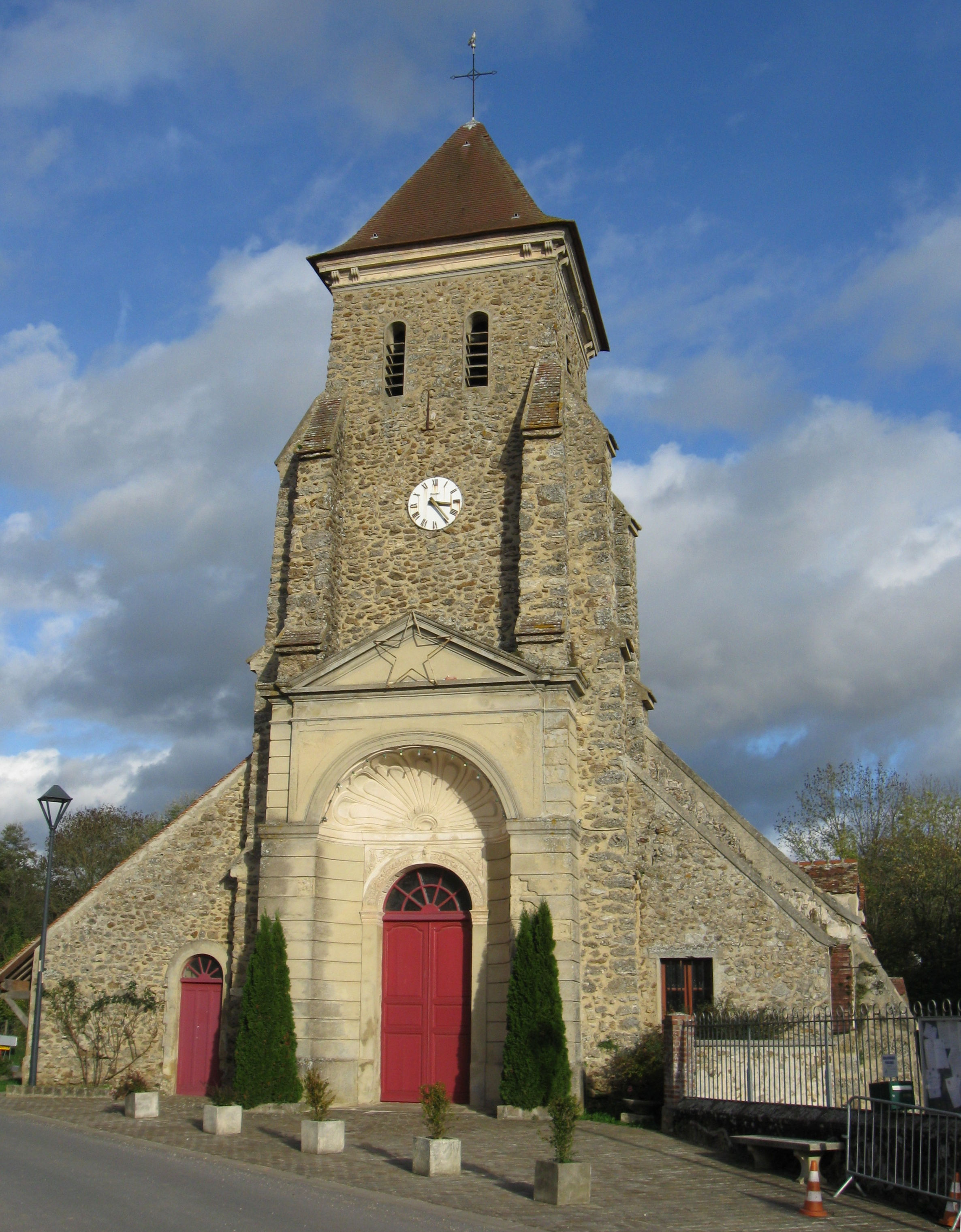 Église Saint-Rufin et Saint-Valère de Bézu-le-Guéry. (département de l'Aisne , région Picardie).